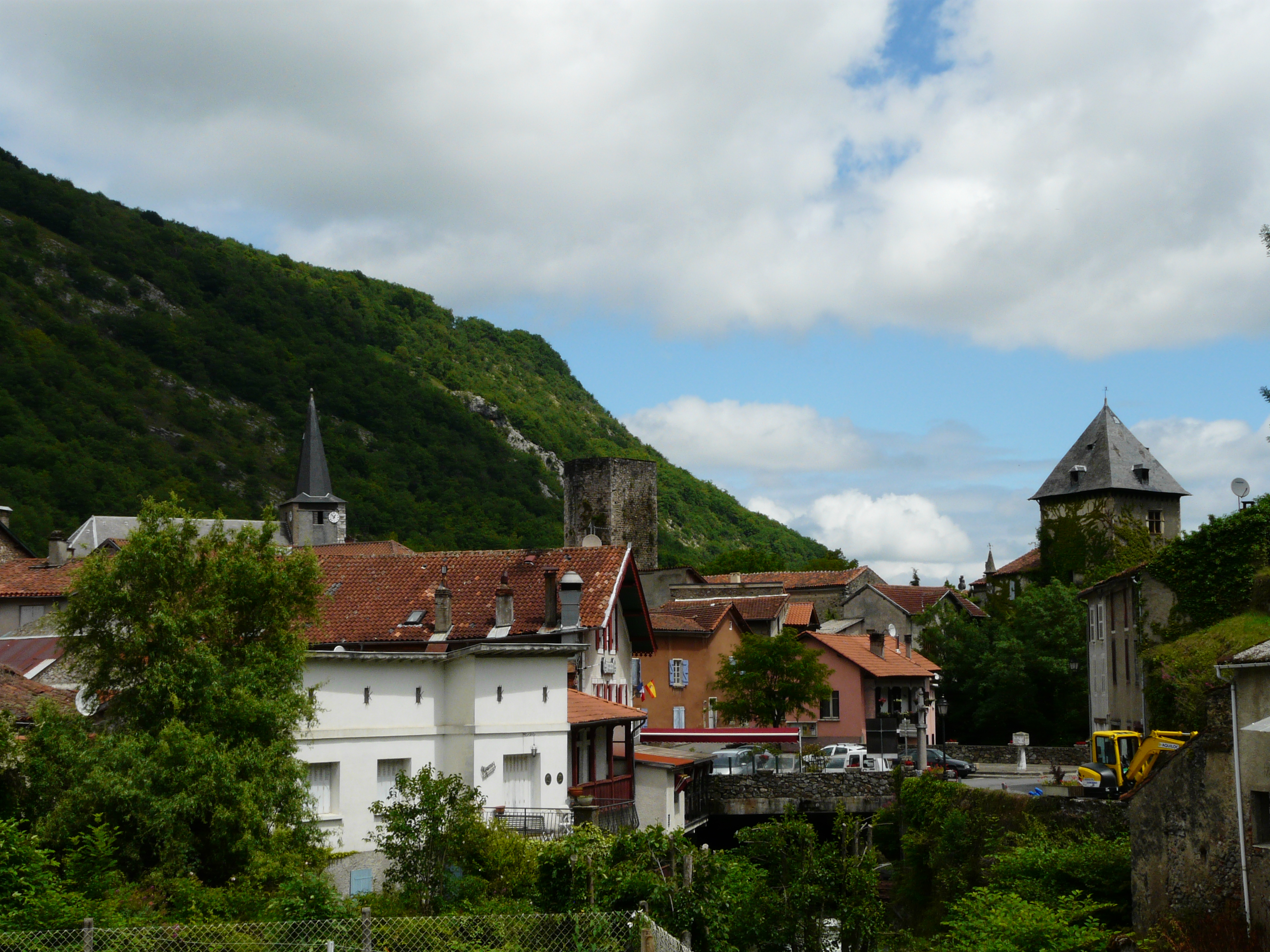 Le village de Mauléon-Barousse, Hautes-Pyrénées, France.